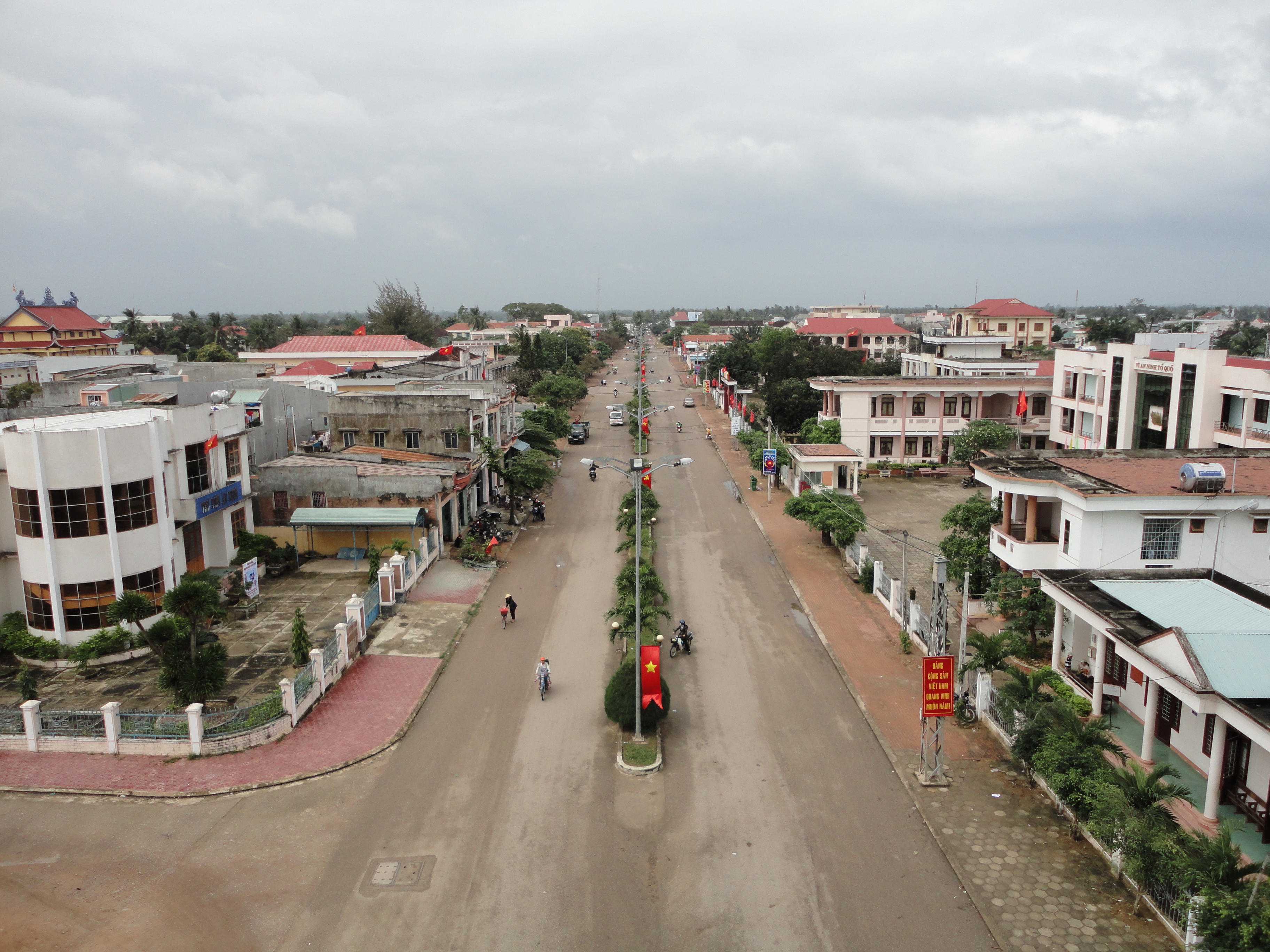 Đường Lê Hồng Phong, Phường Bình Định, thị xã An Nhơn, tỉnh Bình Định